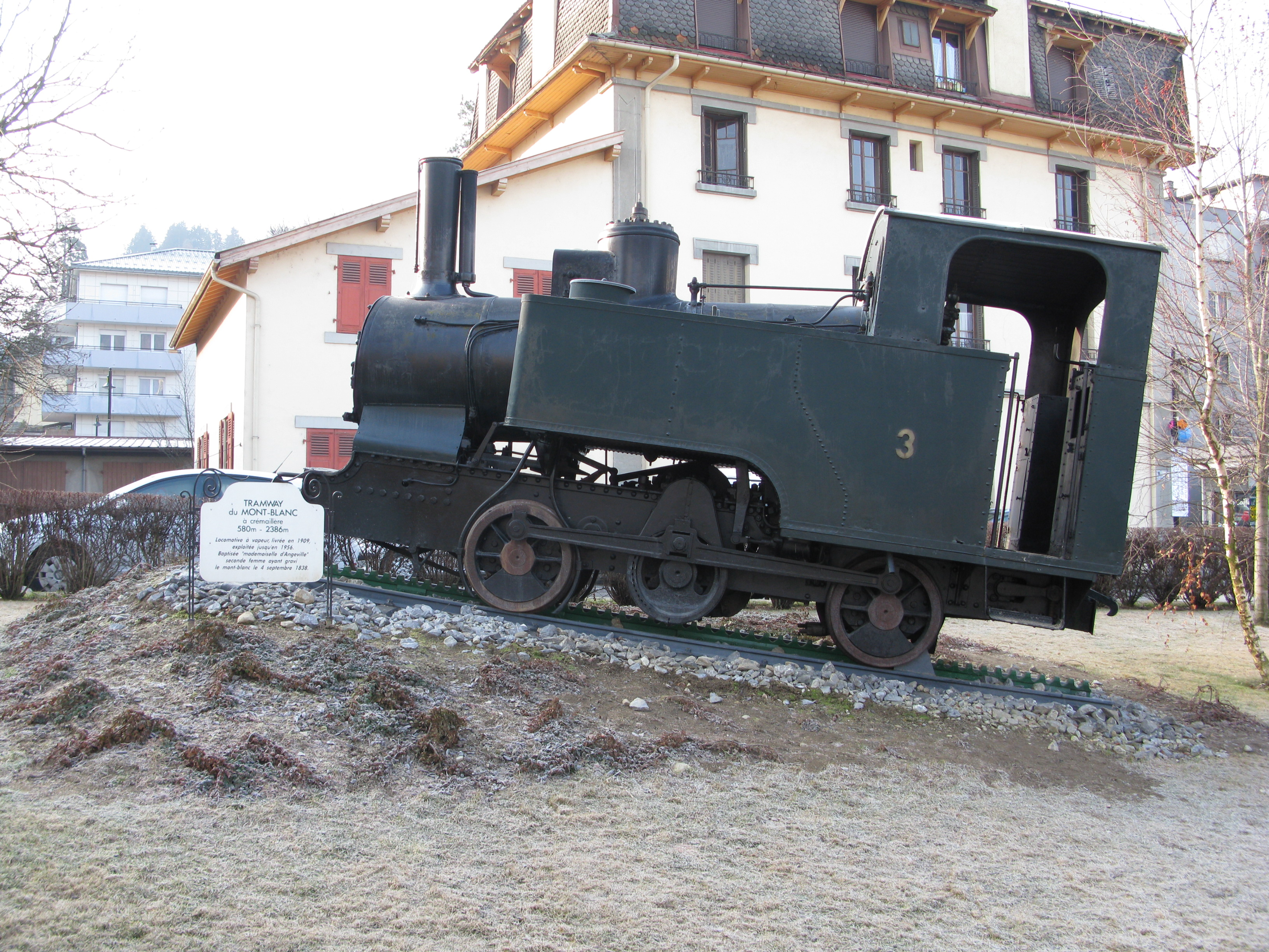 Locomotive à vapeur du tramway du mont blanc, exposée devant la gare de Saint-Gervais-les-Bains-Le Fayet